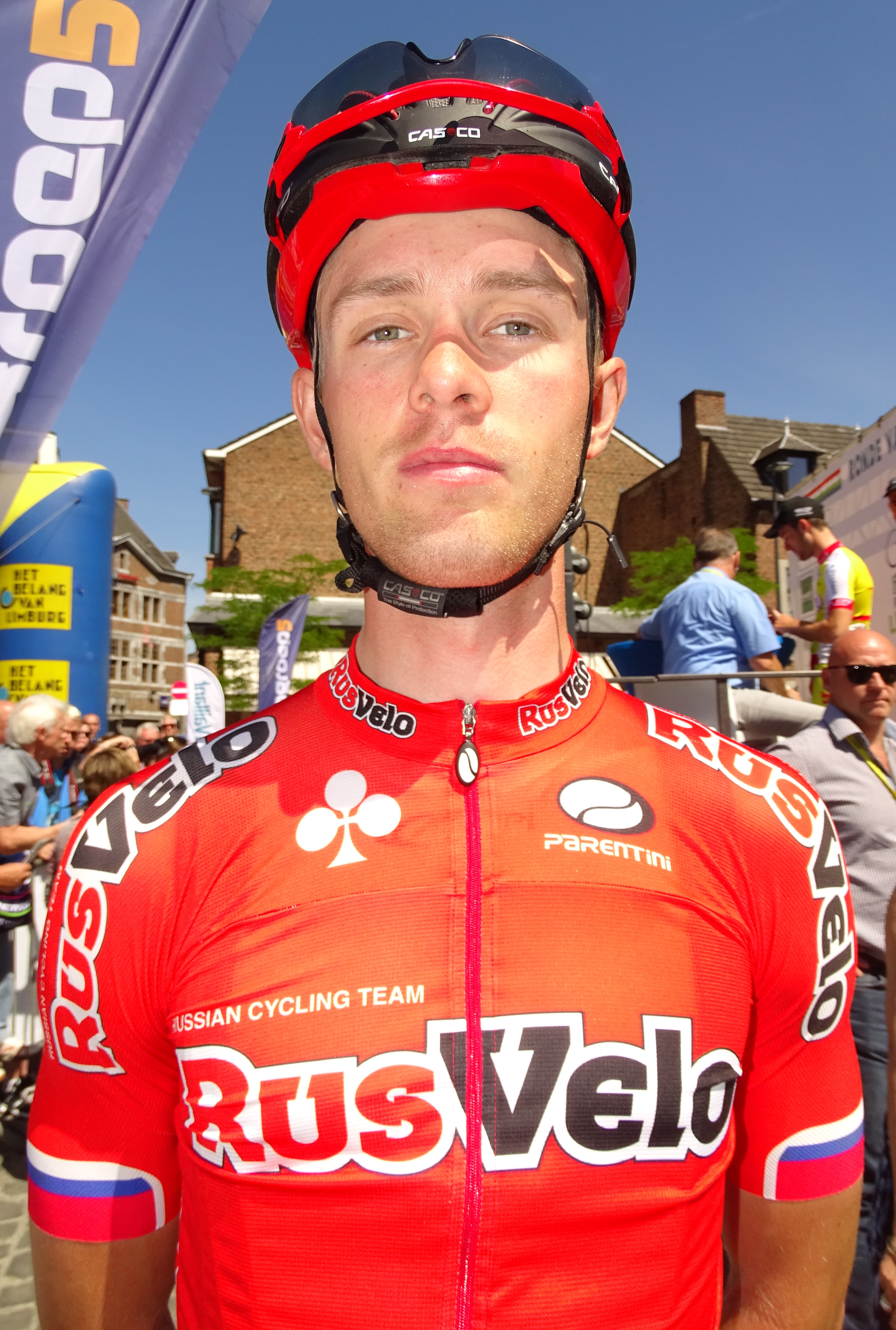 Reportage réalisé le dimanche 14 juin à l'occasion du départ et de l'arrivée du Tour du Limbourg 2015 à Tongres, Belgique.